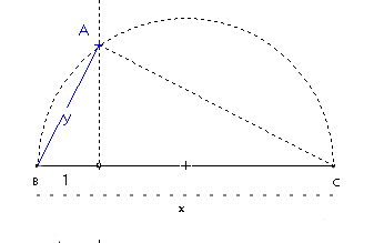 Construction d'une racine carrée à la règle et au compas. Image personnelle. Licence GFDL Utilisateur:HB